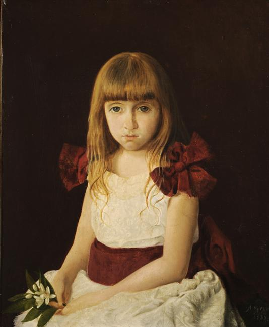 Γεώργιος Άβλιχος, Κοριτσάκι